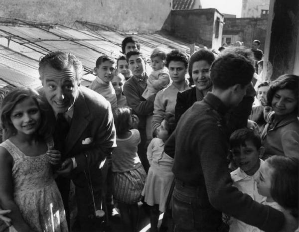 Napoli. Il regista Vittorio De Sica durante i sopralluogi del film "L'oro di Napoli". Folla.